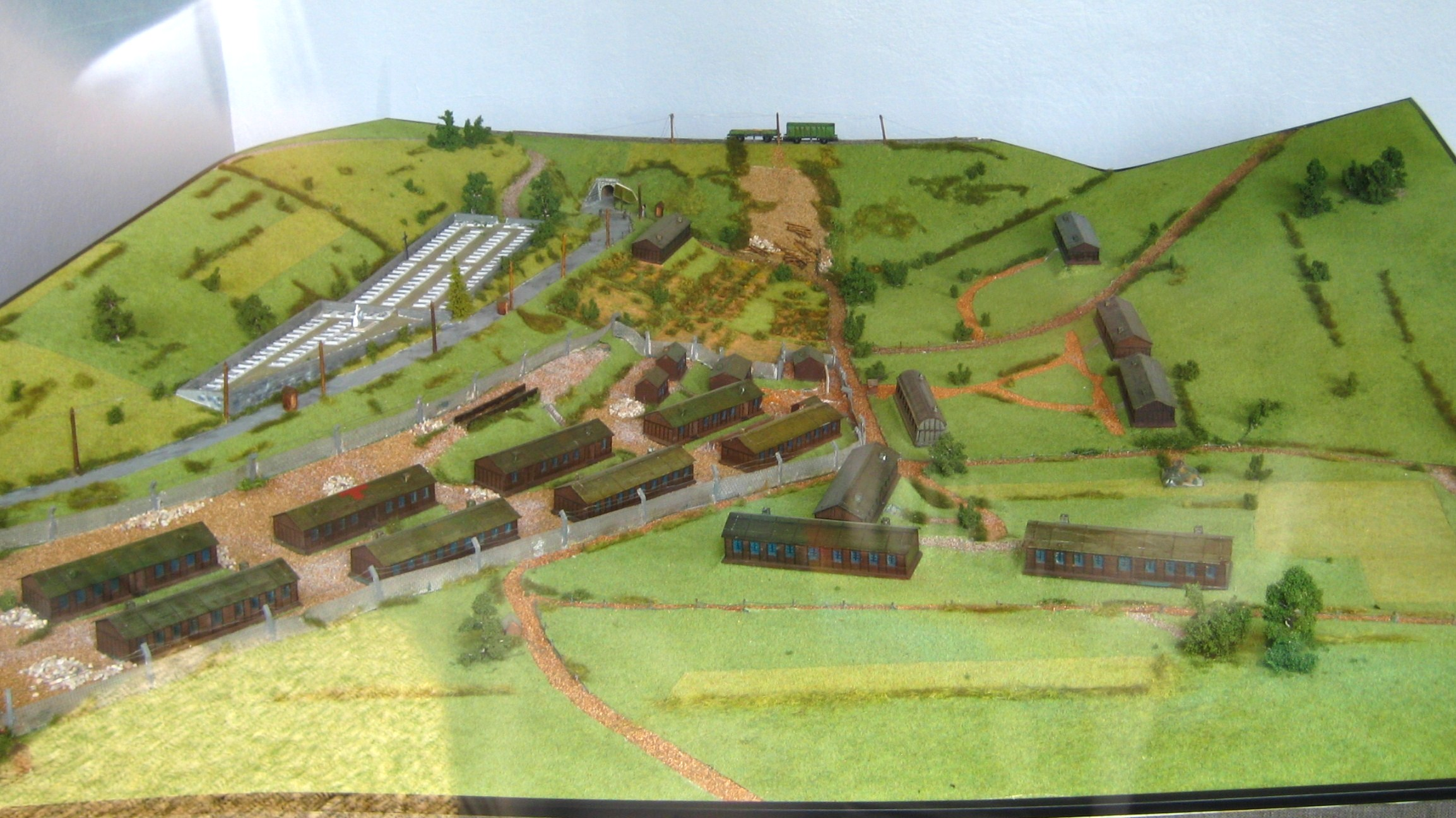 Maquette du Camp de Thil